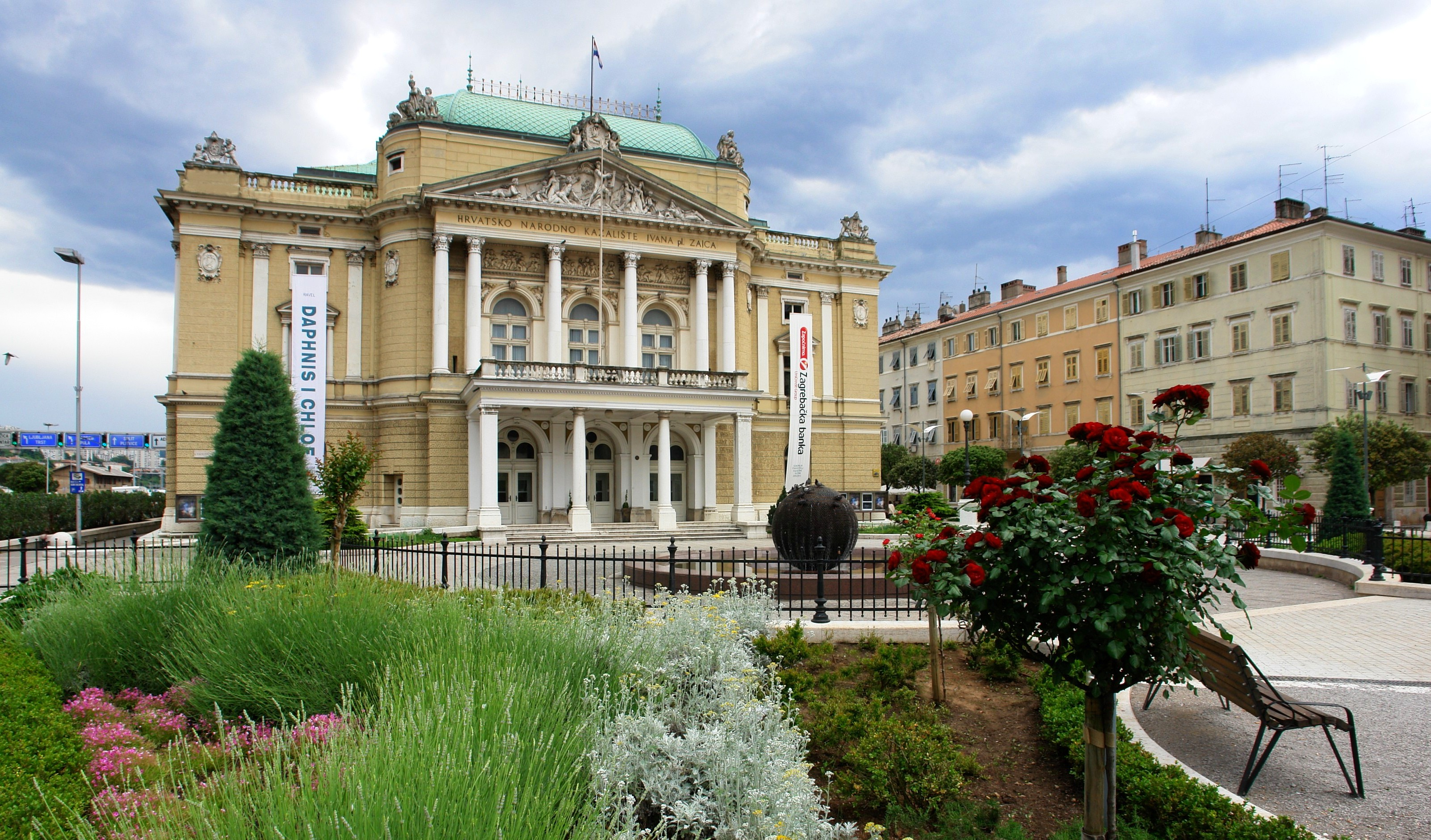 Fiume, Nemzeti Színház. Croatian National Theatre Ivan pl. Zajc in Rijeka.